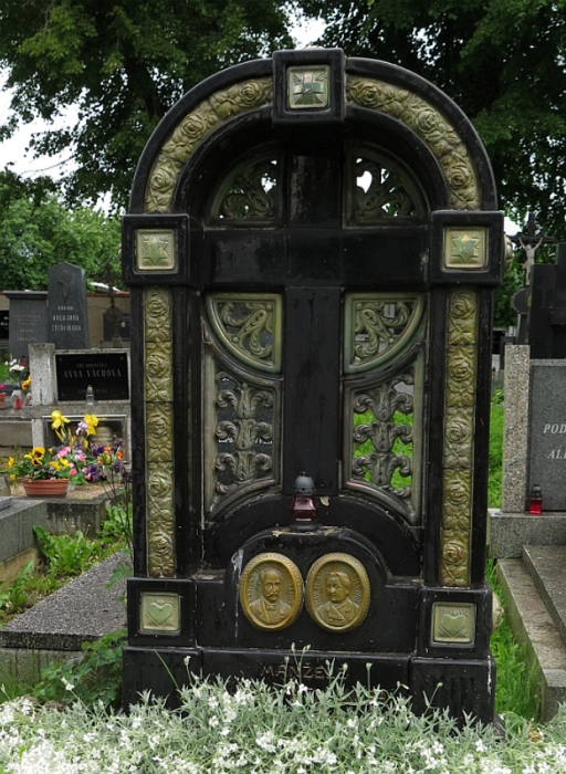 Náhrobek rodiny Jezberovy a náhrobek Václava a Eleonory Fürstových, hřbitov u kostela sv. Rocha, Březnice. Náhrobky se nacházejí v různých částech hřbitova, proto dvojfoto.